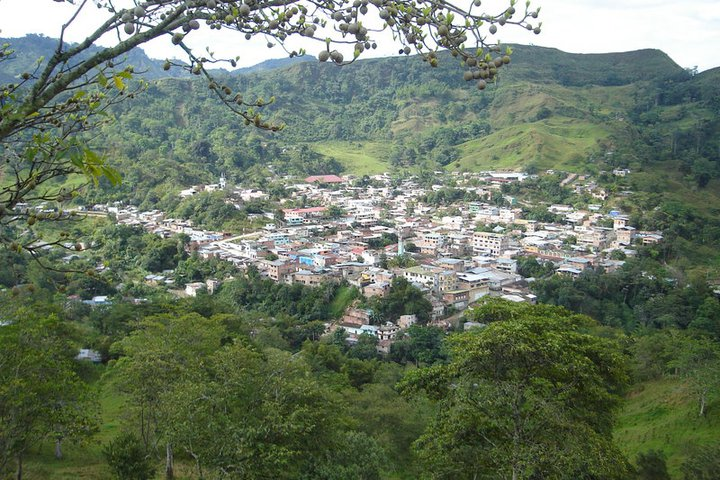 Vista del Casco Urbano desde la vereda Porvenir